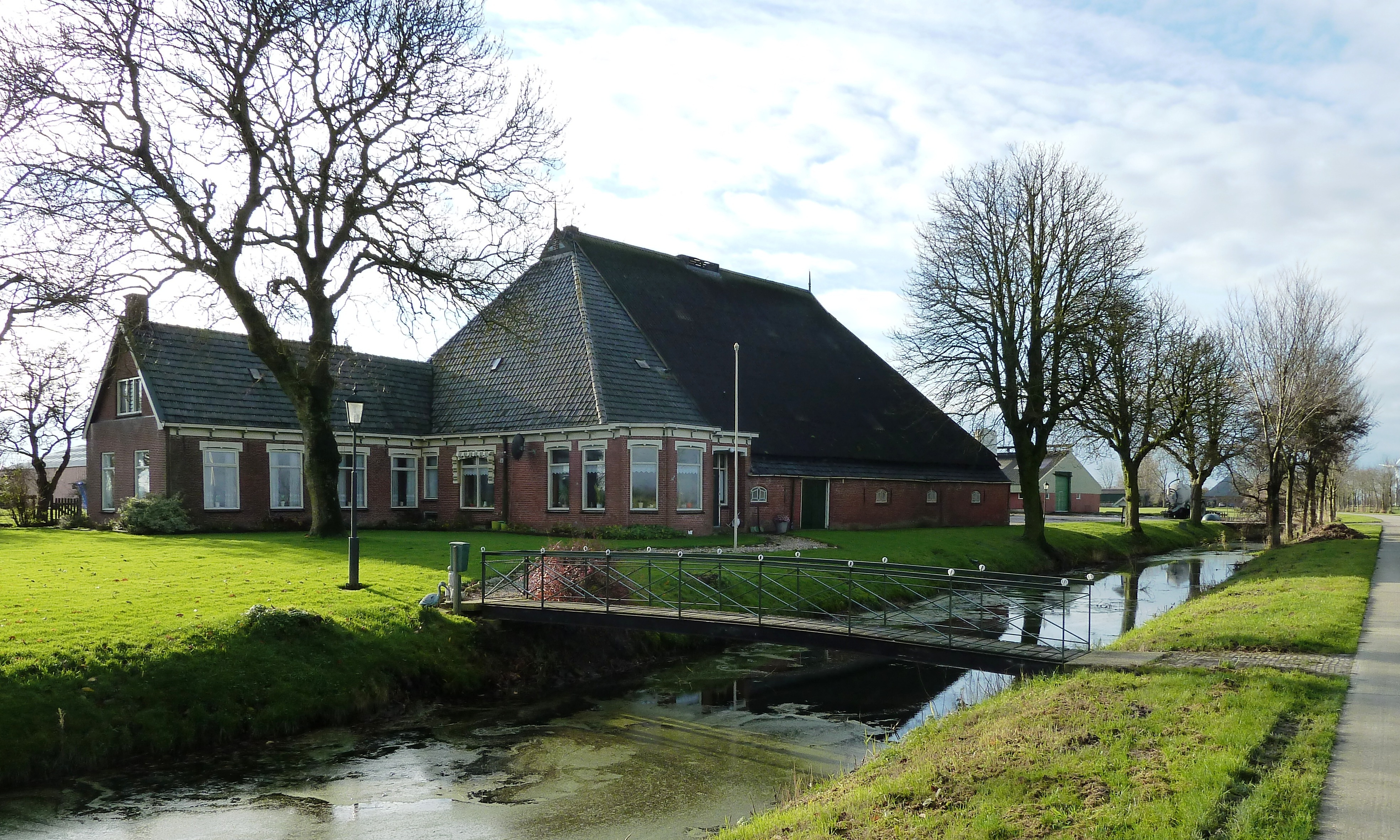 Boerderij 'Vrouwenklooster Galilea' nabij het voormalige klooster Galilea in de Friese gemeente Kollumerland en Nieuwkruisland.